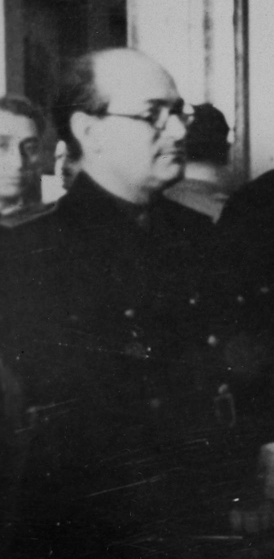 El ministre espanyol d'Educació José Ibáñez Martín visita el Museo del Prado.